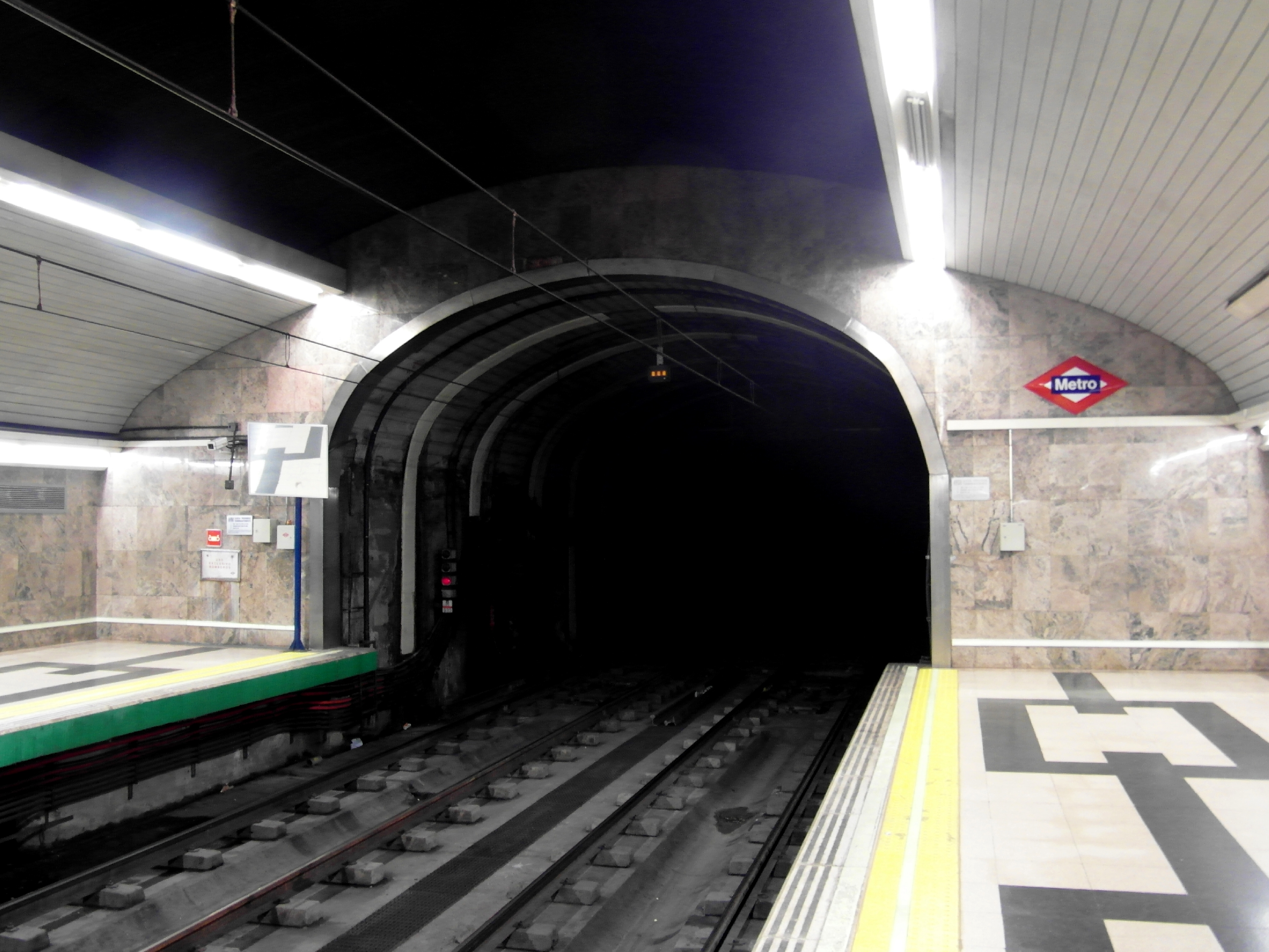 Madrid - Metro - Estación de Núñez de Balboa